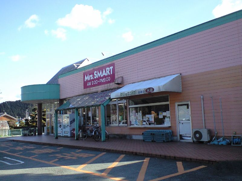 ミセススマート粥見店（三重県松阪市）